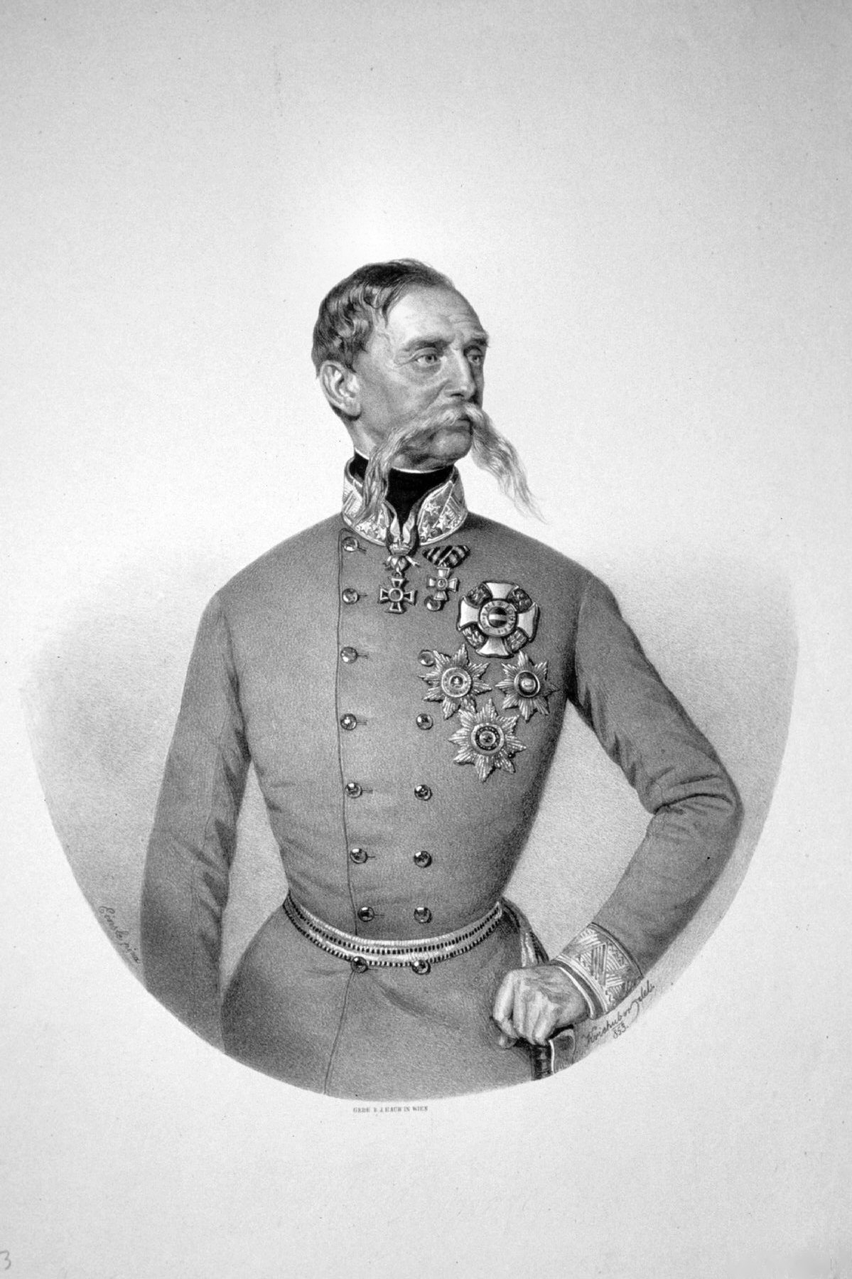 Julius Freiherr von Haynau (1786-1853), k. k. Feldzeugmeister.